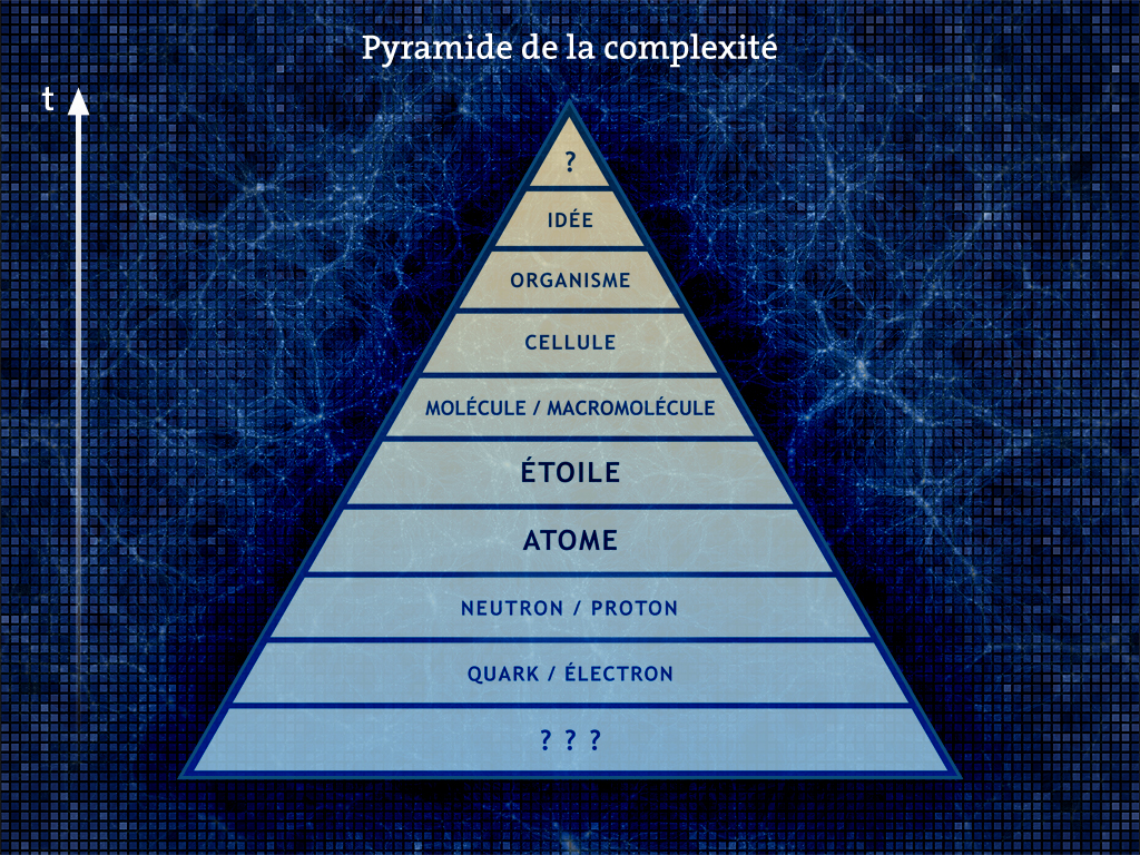 Version de la pyramide de la complexité